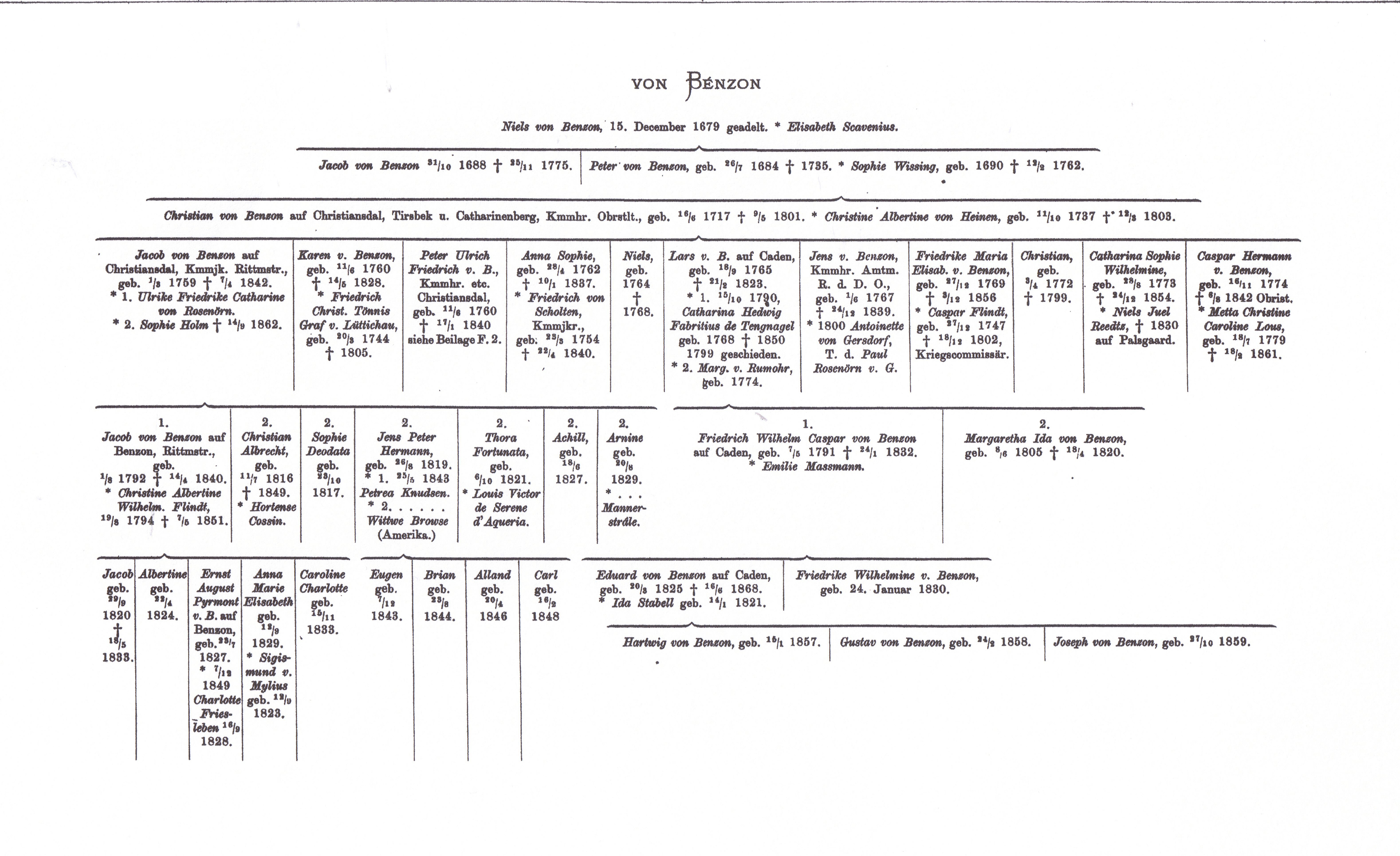 Stammtalfel der Adelsfamilie von Benzon (ein Zweig der Adelsfamilie von Ahlefeldt) aus dem Jahr 1869